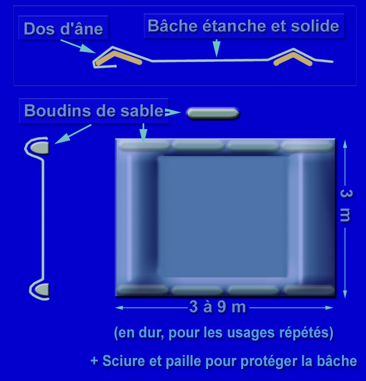 principe de construction d'un rotoluve provisoire, destiné à nettoyer, désinfecter ou décontaminer les roues de véhicules. Auteur : F. Lamiot